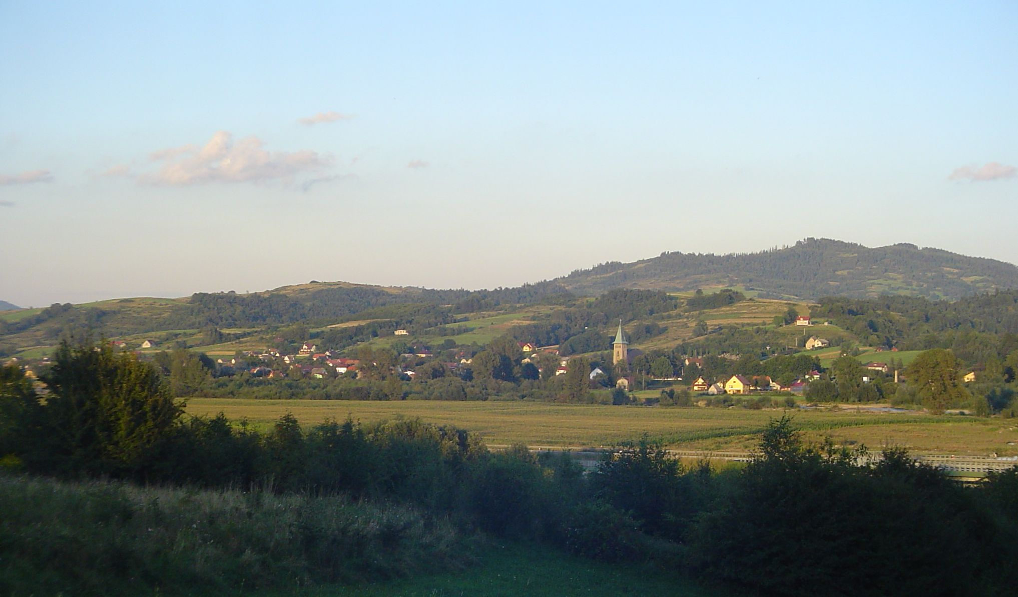 Wieś Wieprz (województwo śląskie, powiat żywiecki), widok z drogi DK69.